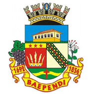 Brasão de Armas do município de Baependi,sul de Minas Gerais, Brasil